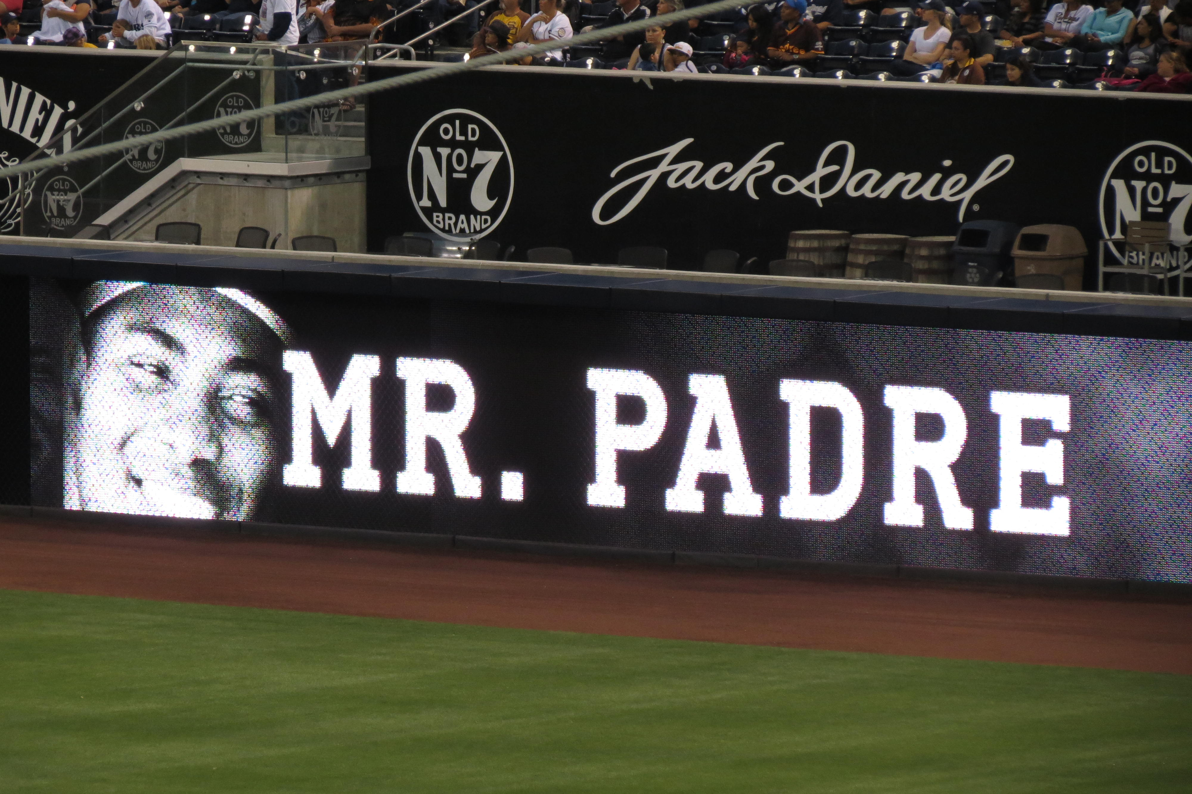 Tony Gwynn was known as "Mr. Padre"